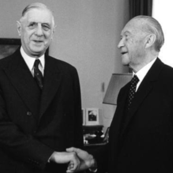 Der französische Staatspräsident Charles de Gaulle und Bundeskanzler Konrad Adenauer